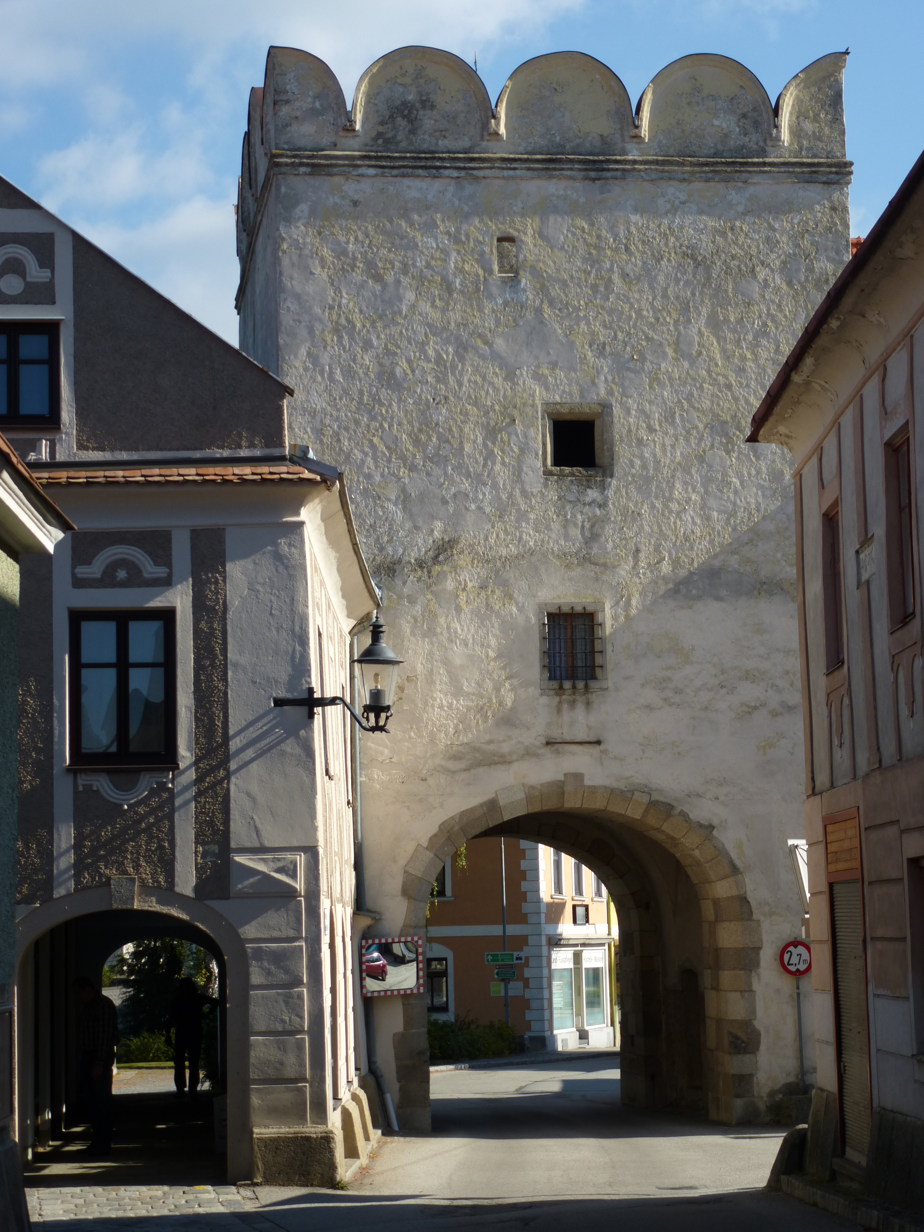 Oberes Tor, Innenseite